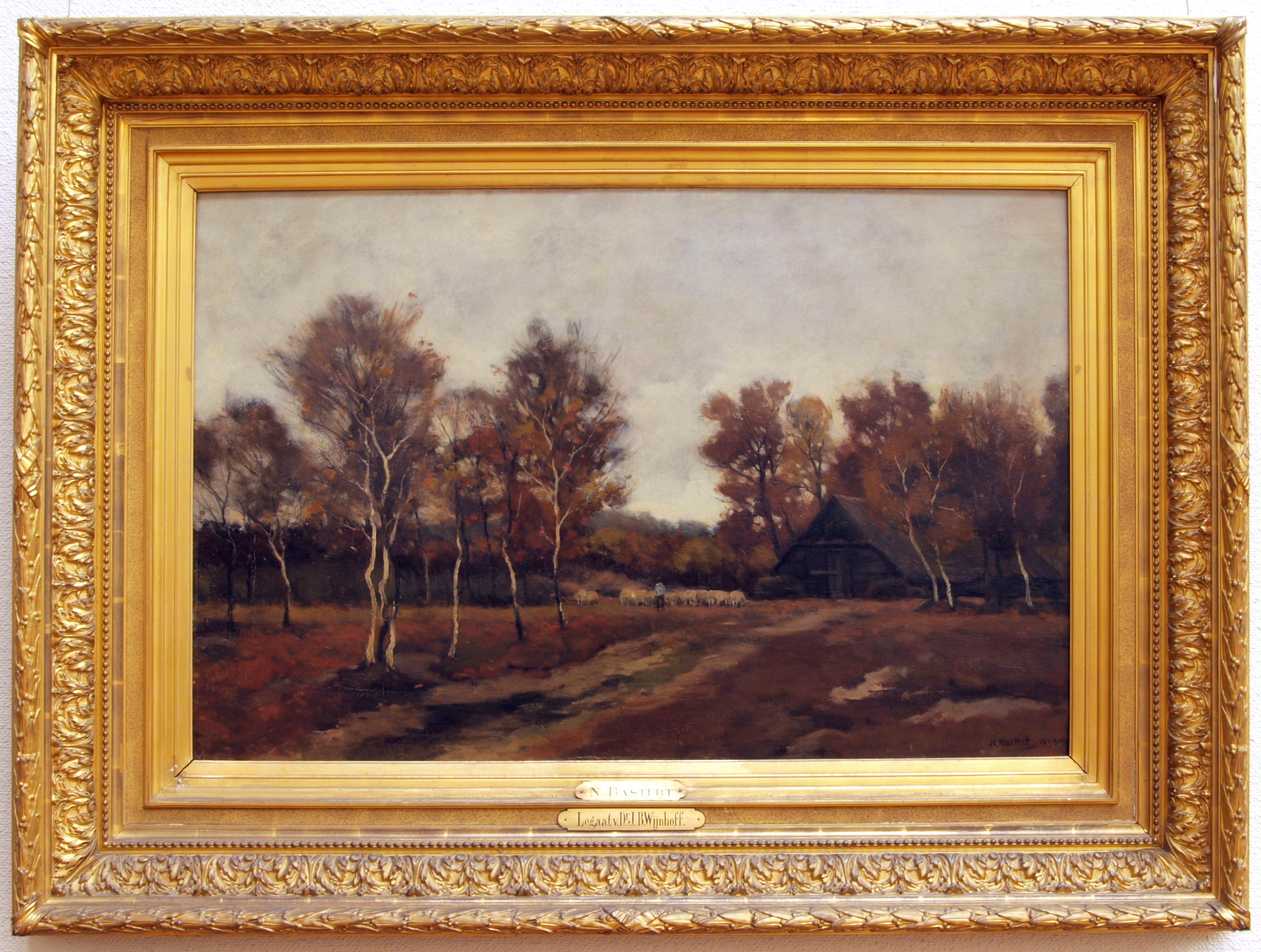 Syvert Nicolaas Bastert (1854-1939), De schaapskooi, 1893, Olieverf op doek.